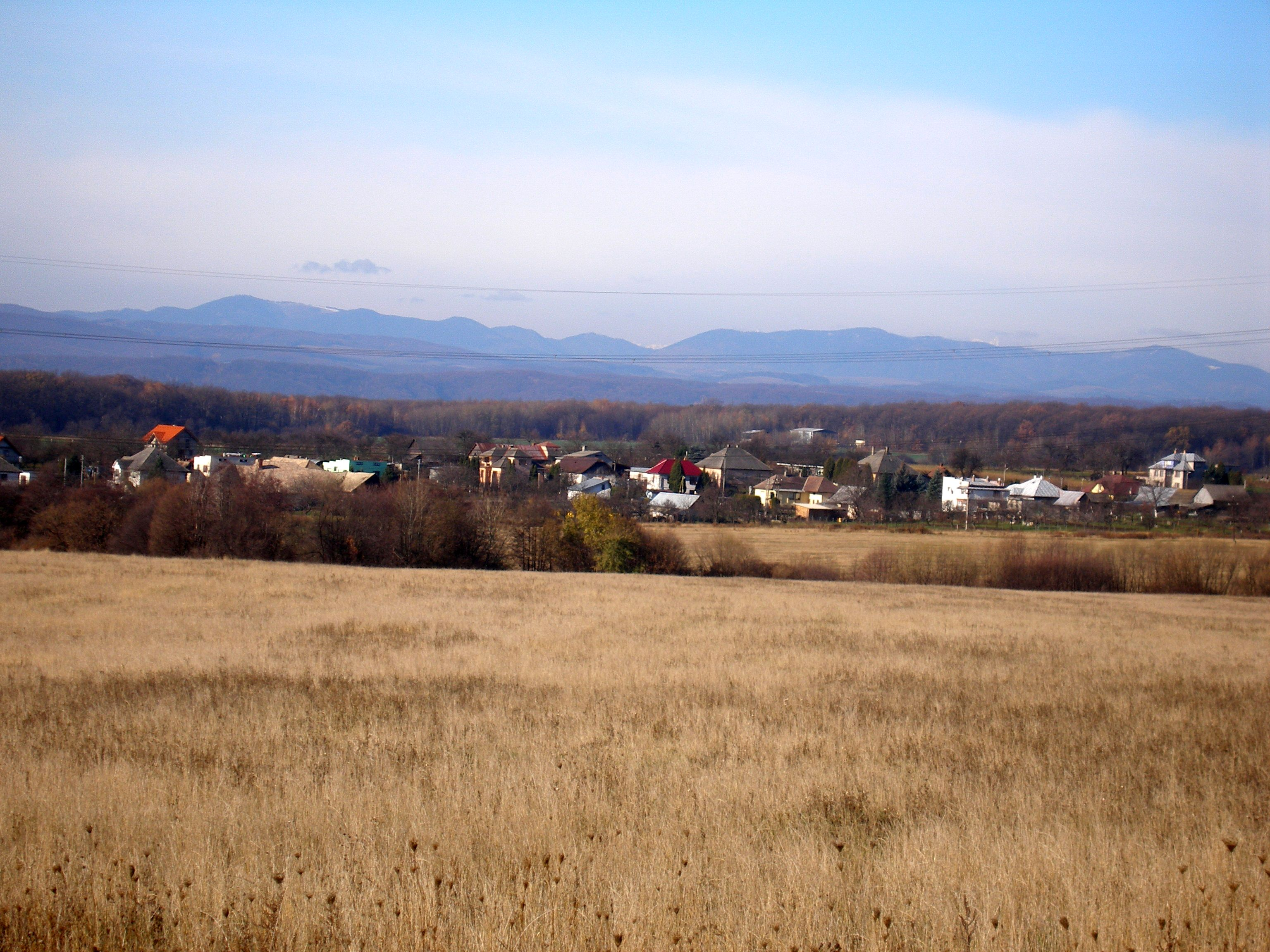 Obec Žehňa v okrese Prešov